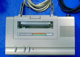 Commodore 1520 Farbplotter